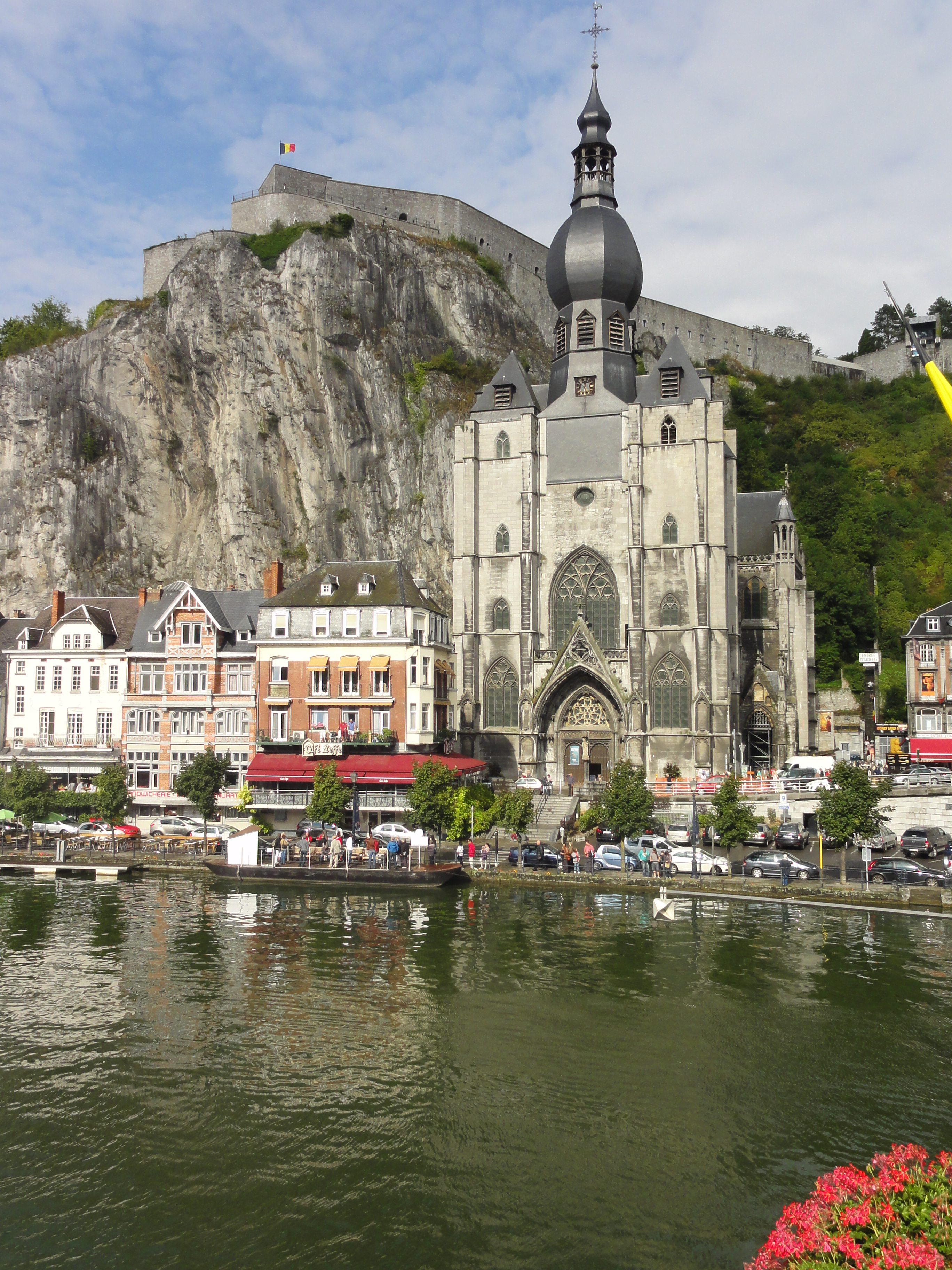 Collégiale Notre-Dame de Dinant.